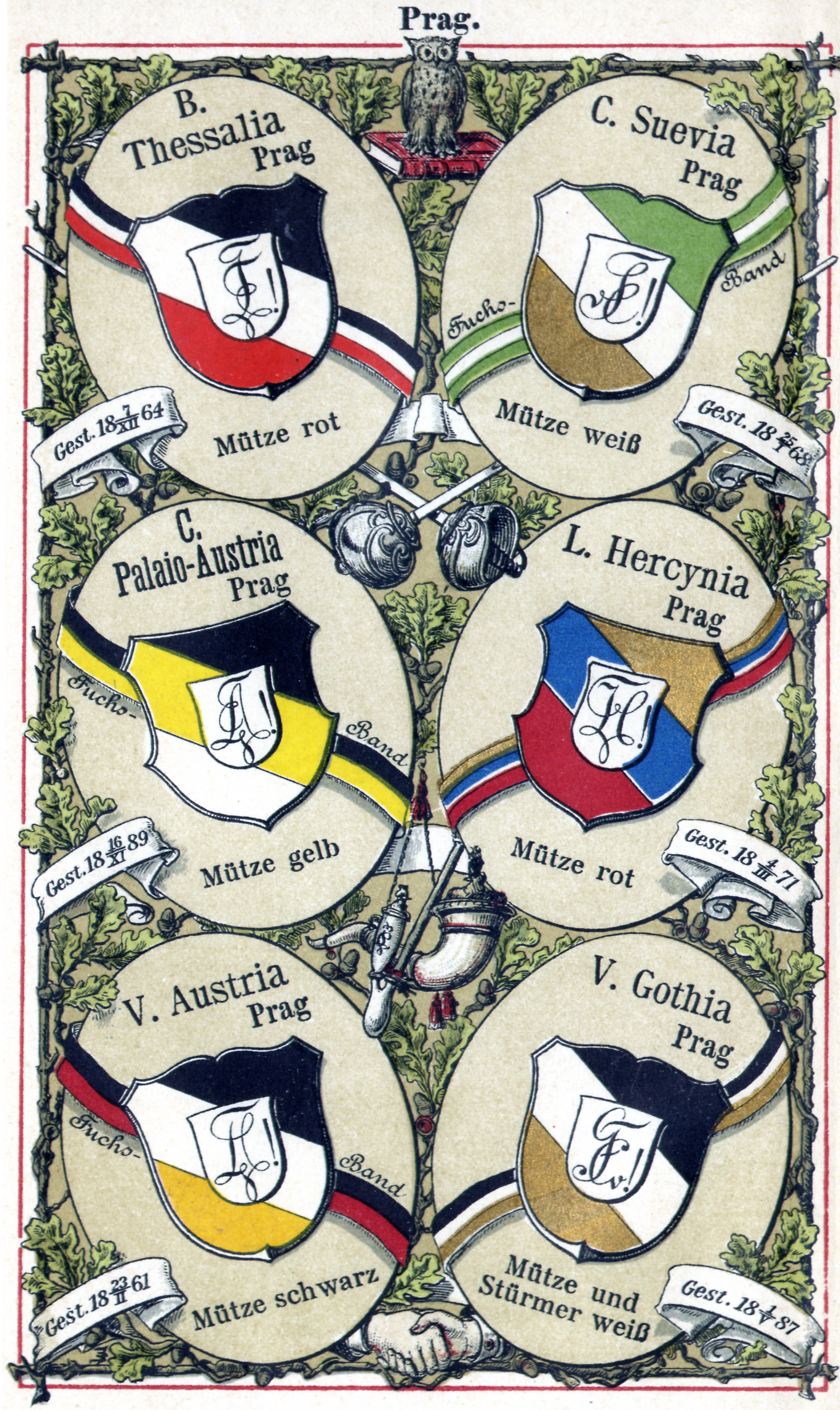 Couleur der wichtigsten Studentenverbindungen in Prag